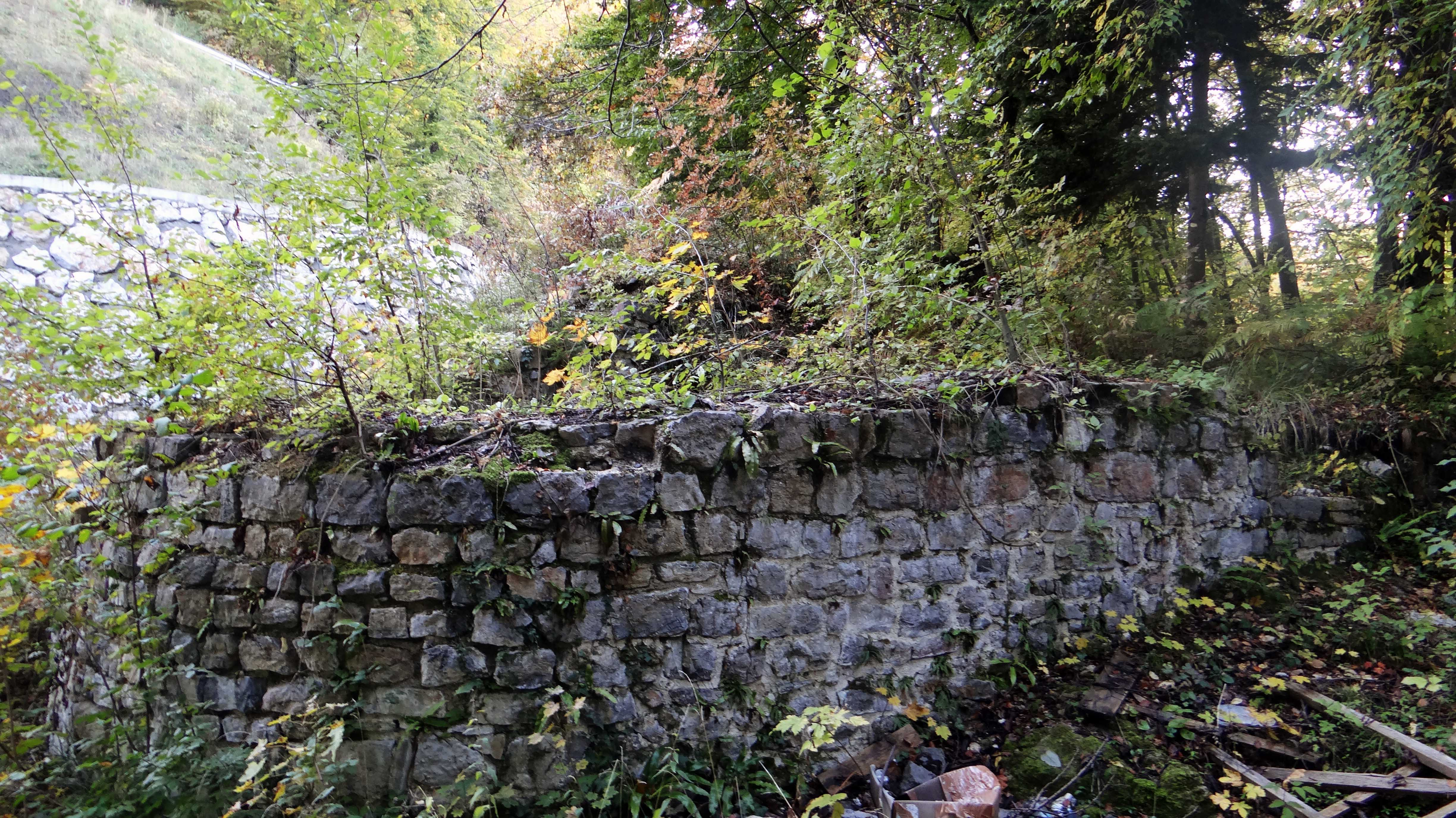 Ruševina gradu Gorenji Mokronog I. (Obernassenfuls), Gorenji Mokronog